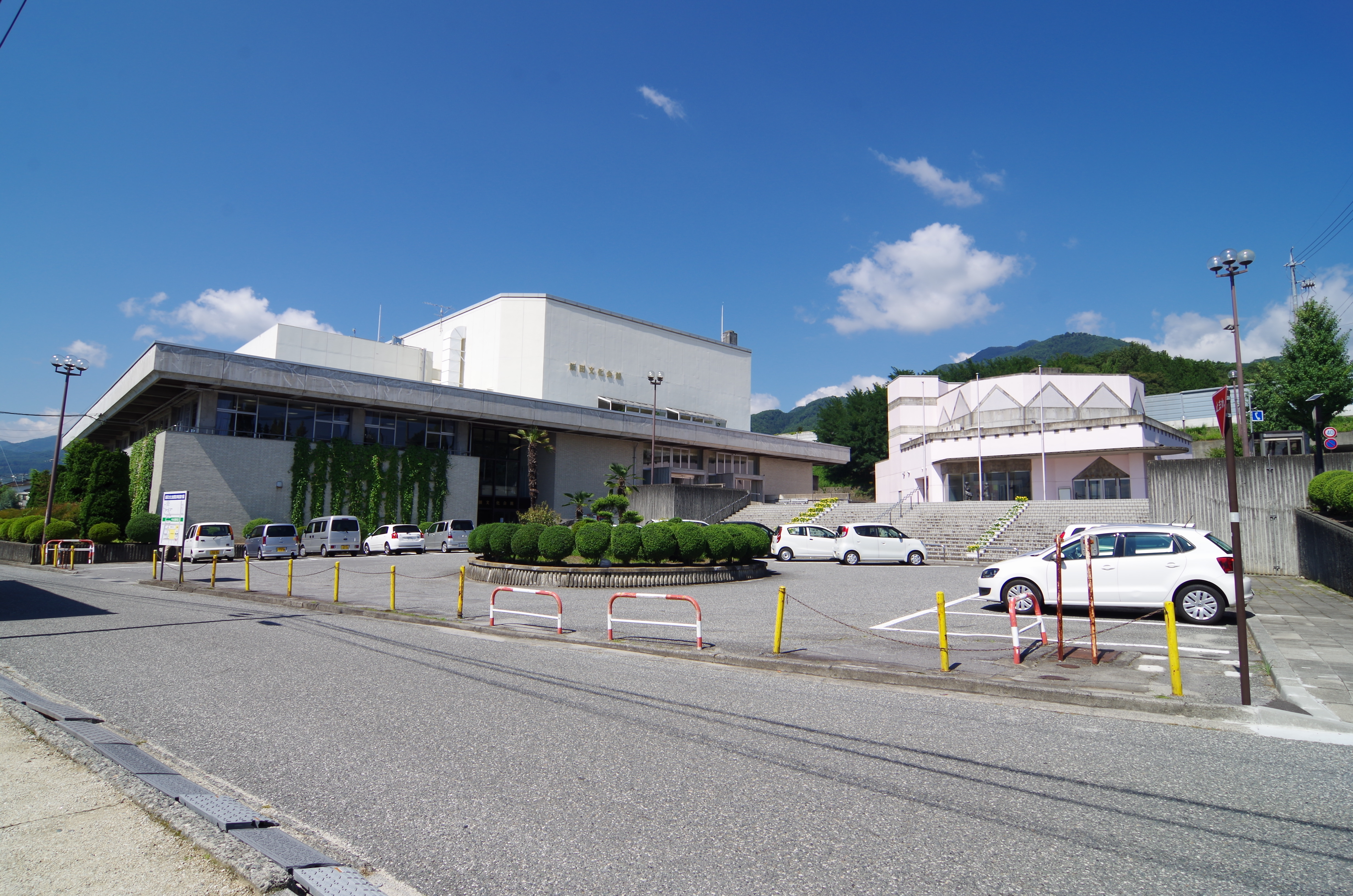 飯田文化会館と飯田人形劇場 2014.9.09